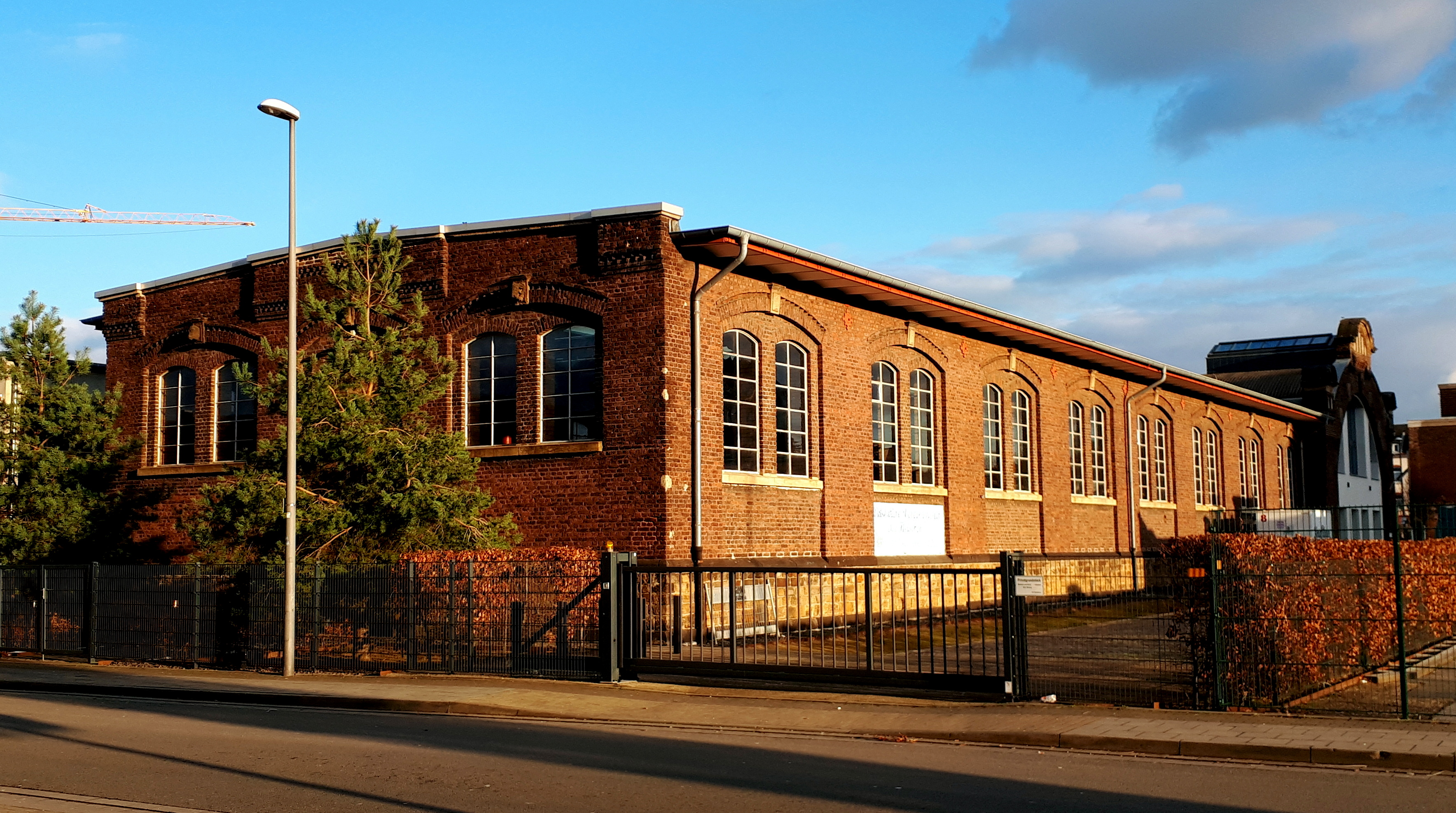 Kälberschlachthalle des Alten Schlachthofes Aachen, heute Eventgebäude, Baudenkmal